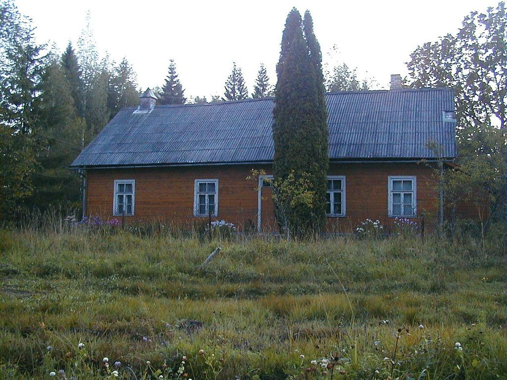 Sprogu katoļu baznīca Dampadruvā 2003-09-05